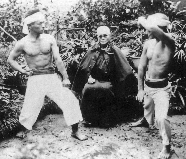 喜屋武朝徳 (Kyan Chotoku, 1870 - 1945)